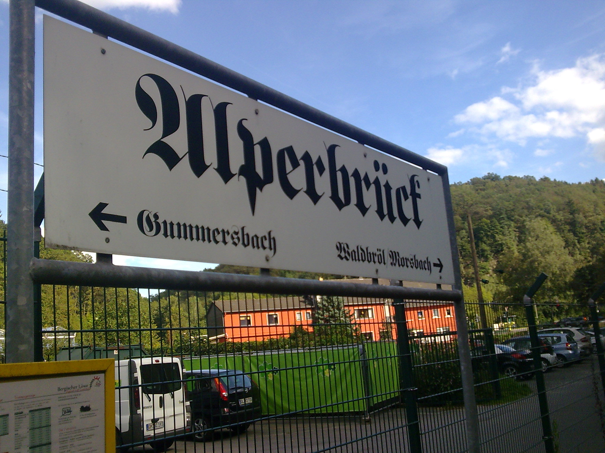 Stationsschild am Haltepunkt Alperbrück